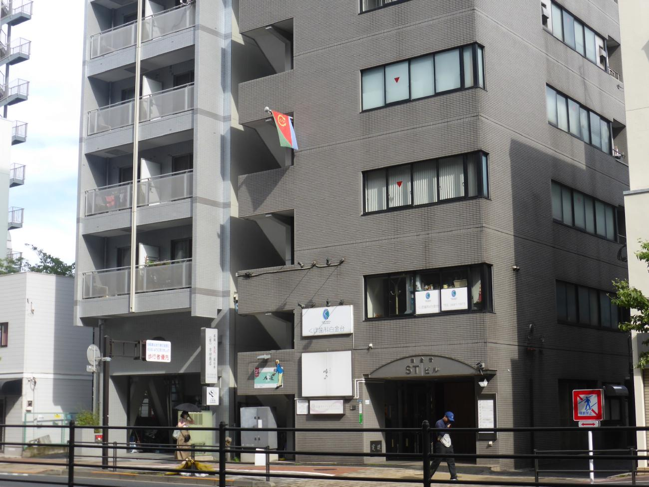 エリトリア国旗が掲揚されている